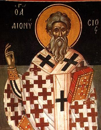 Pope Dionysius of Alexandria. Дионисий Александрийский